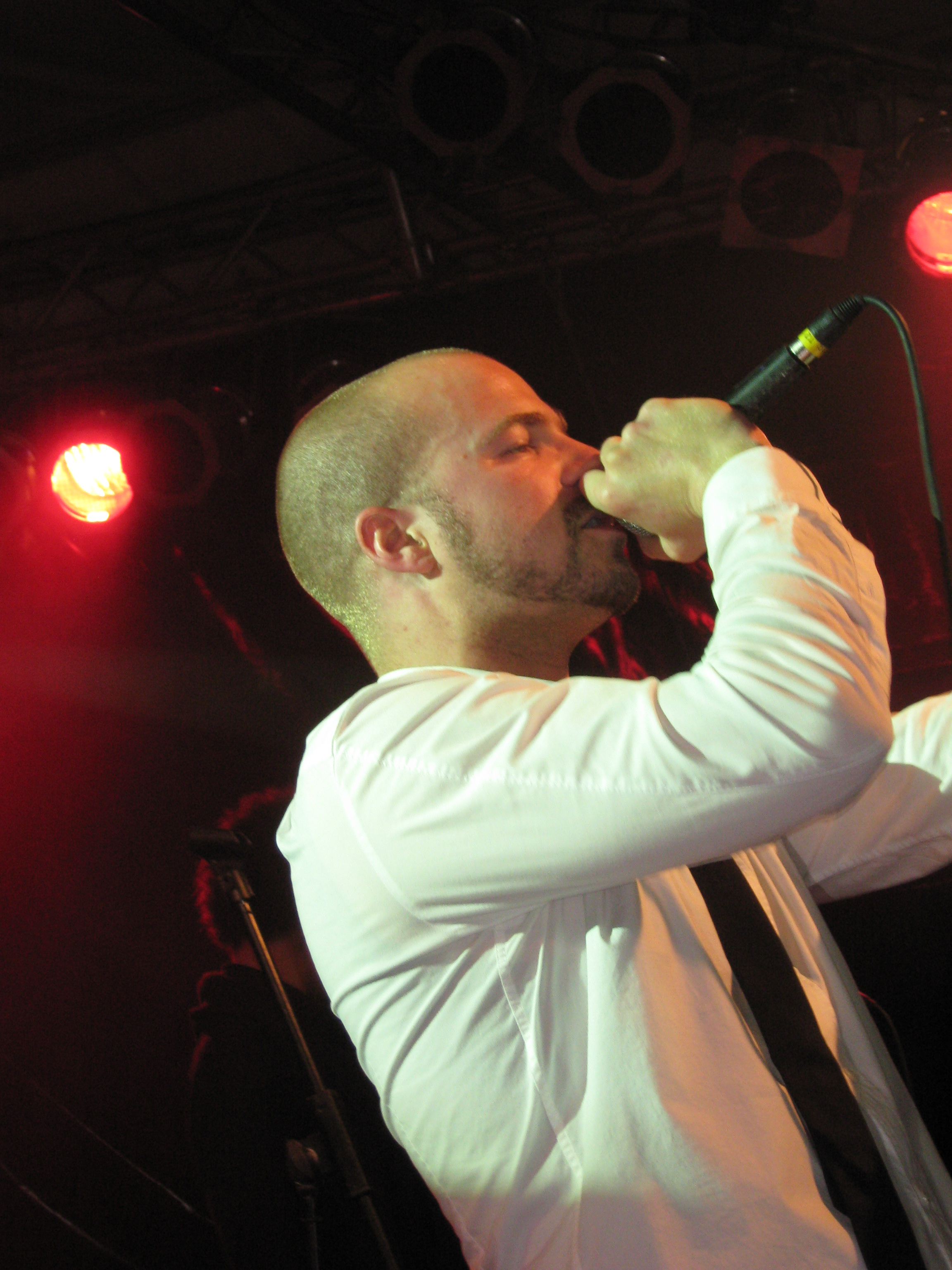 Curse beim Rock am Teich 2009